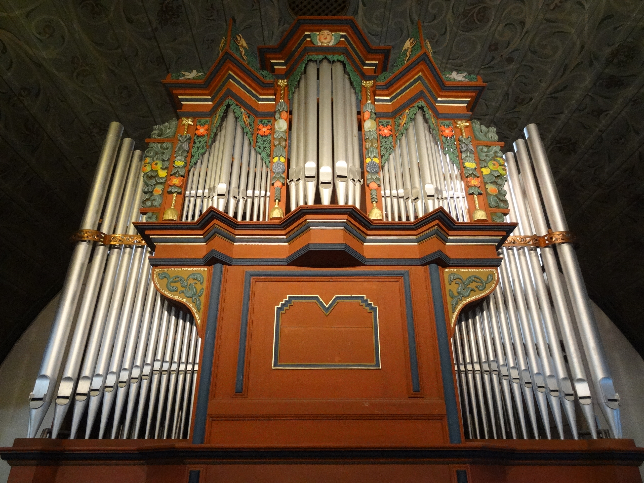 Evangelische Pfarrkirche (Griedel)